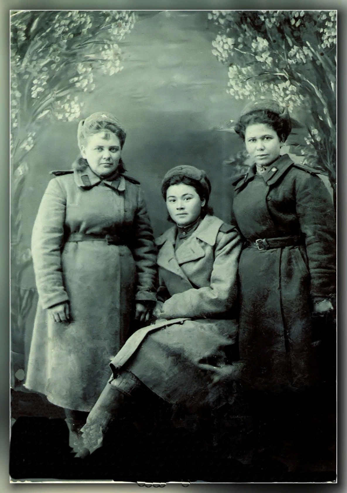 Умутдинова-Хатмуллина Нажиба Галимьяновна. Воевала в составе 85 дивизии Противовоздушной обороны,,наблюдатель наблюдательного поста 63-го Отд.бат.ВПОС.